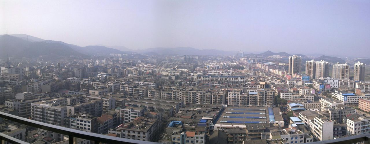 衡山县开云镇